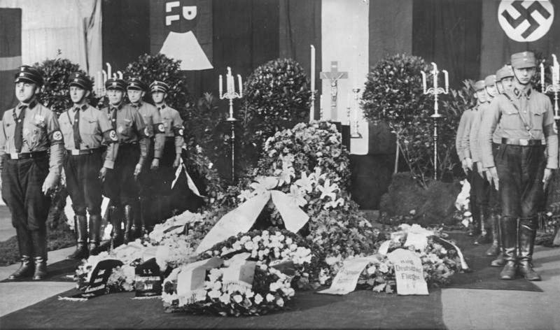 Hamburg, Aufbahrung Marga von Etzdorf, SS-Ehrenwache Marga von Etzdorf in der Heimat. Mit dem Dampfer "Thessalia" ist gestern (6.7.) der Sarg mit den sterblichen Überresten der bekannten Fliegerin Marga v[on] Etzdorf in Hamburg eingetroffen. Der Hamburger Luftsportverband veranstaltete heute (7.7.) eine Trauerfeier, an der auch die Schwester der Toten teilnahm. Nach der Trauerfeier wurde der Sarg nach Berlin überführt. UBz: die Aufbahrung in Hamburg. Photo: Scherls Bilderdienst [Hamburg.- Aufbahrung Sarg Marga von Etzdorf. Links und rechts: Ehrenwache durch SS-Fliegersturm Hamburg. Datierung: 6. oder 7. Juli 1933] Abgebildete Personen: Etzdorf, Marga von: 1907-1933; Kunstfliegerin, Deutschland (GND 12355800X)